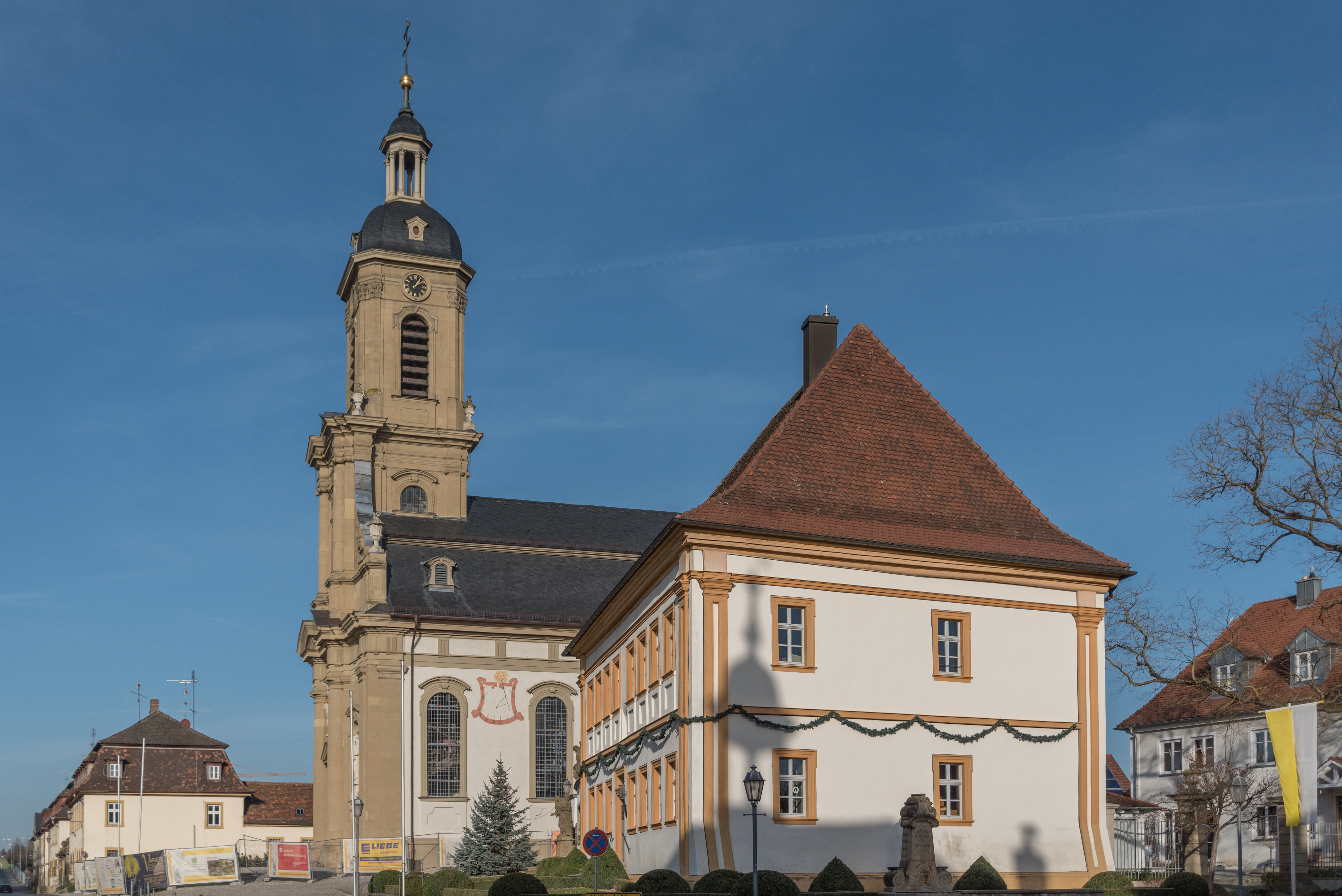 Wiesentheid, Kanzleistraße 2, Schlossplatz 4, 2